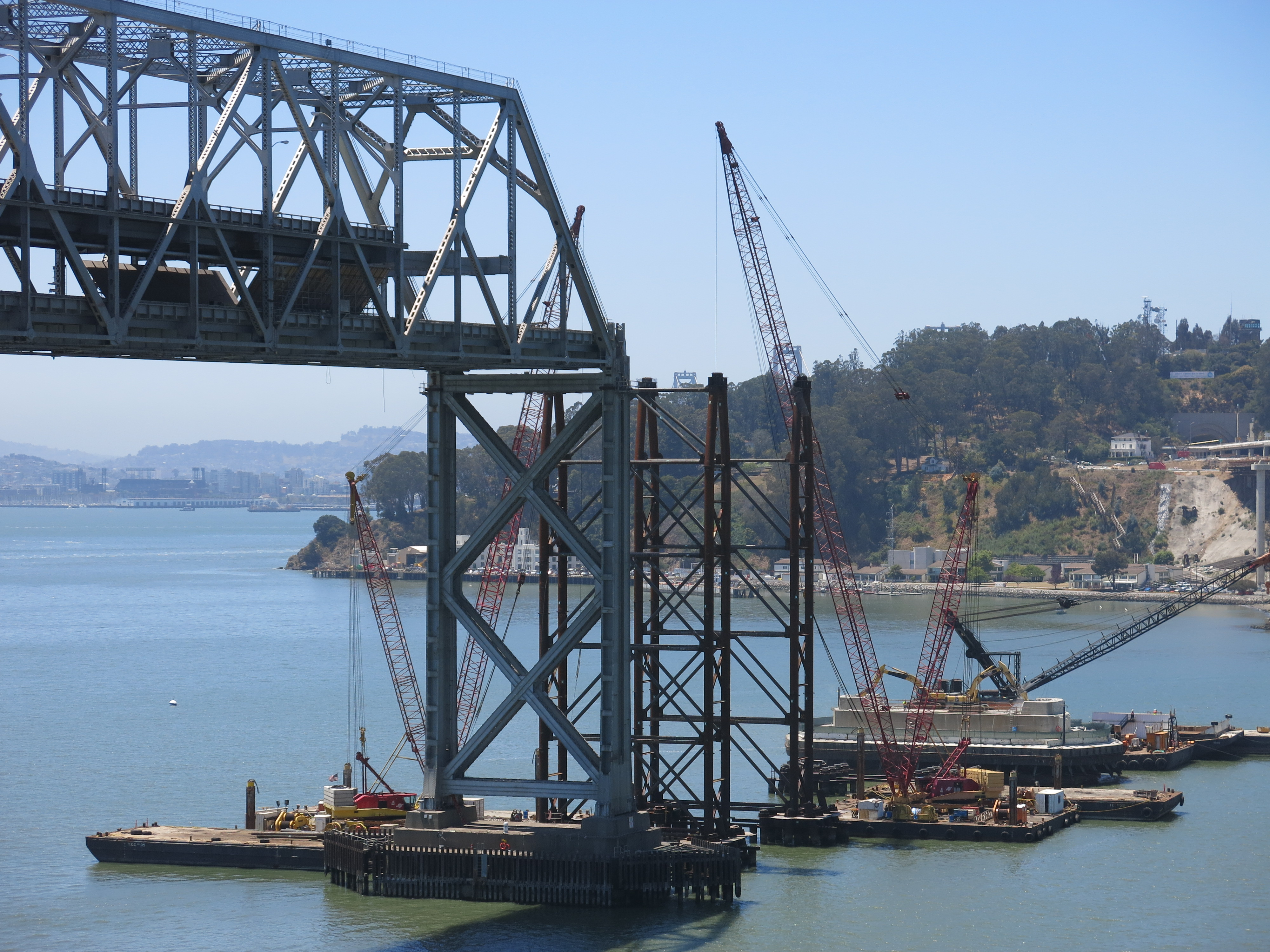 Bay Bridge, Abriss des Brückenpfeiler-Fundaments